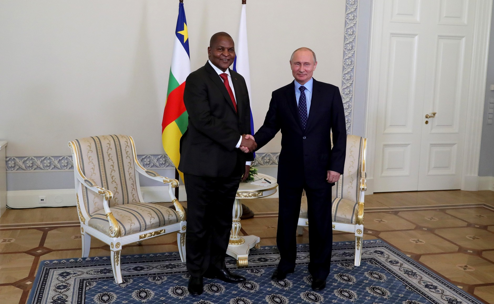 С Президентом Центральноафриканской Республики Фостеном Арканжем Туадерой.